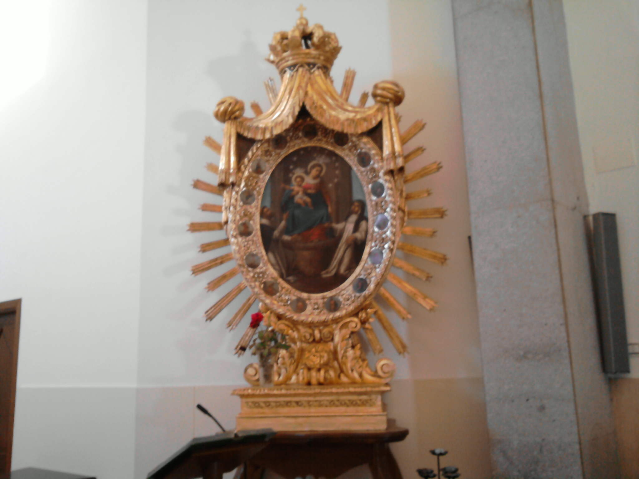 Immagine di Maria Santissima del Rosario custodita nella chiesa dell'Adorazione di Palmi